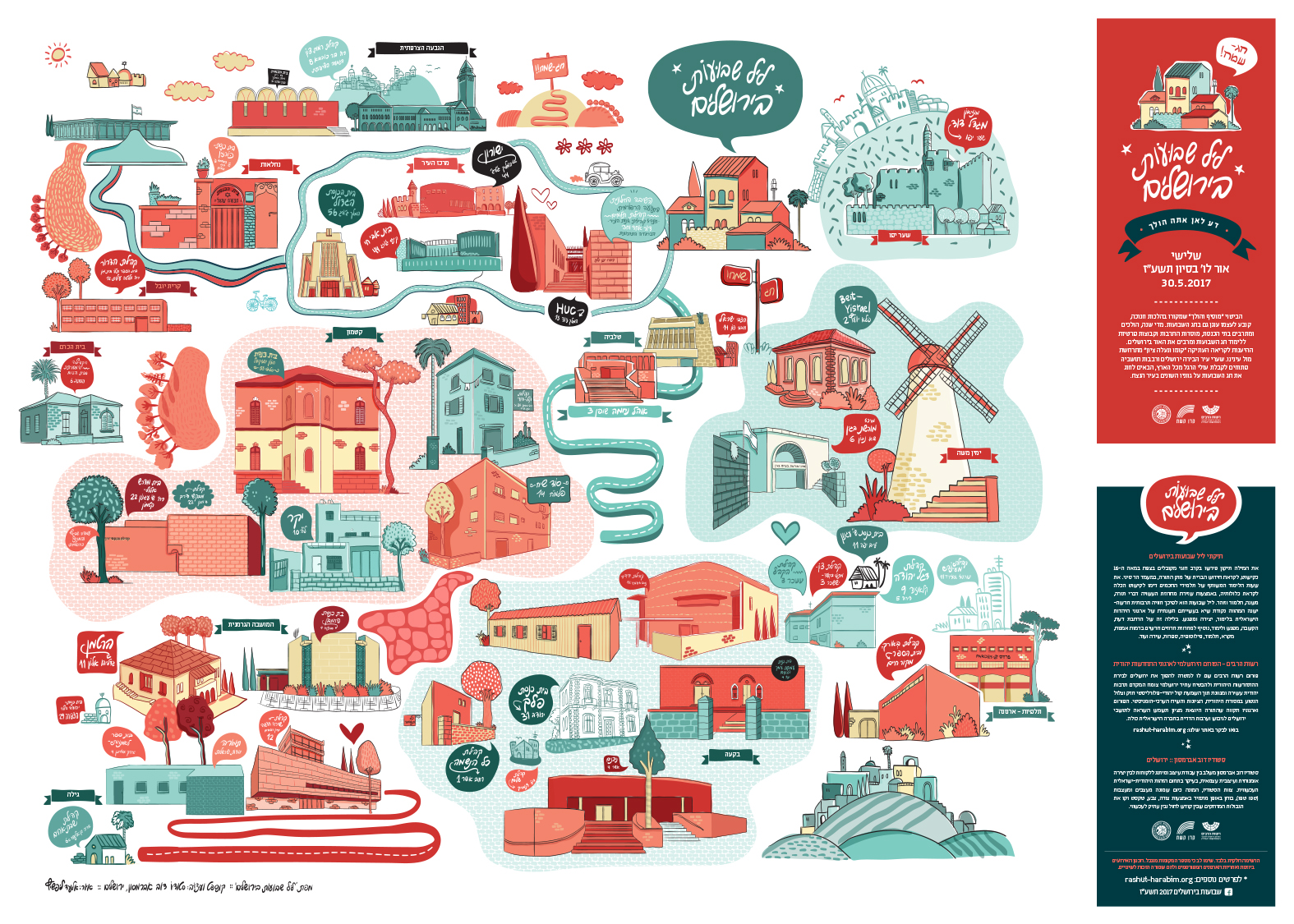 מפה של שיעורי ליל שבועות